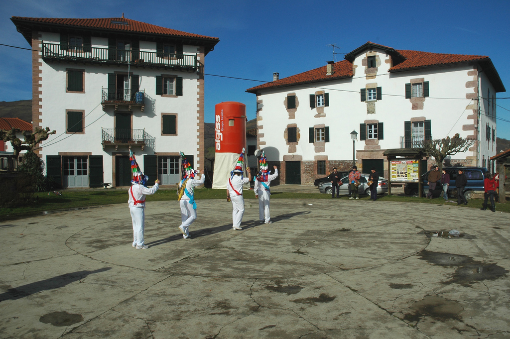 Sagardo-dantza, Arizkun, Baztan.